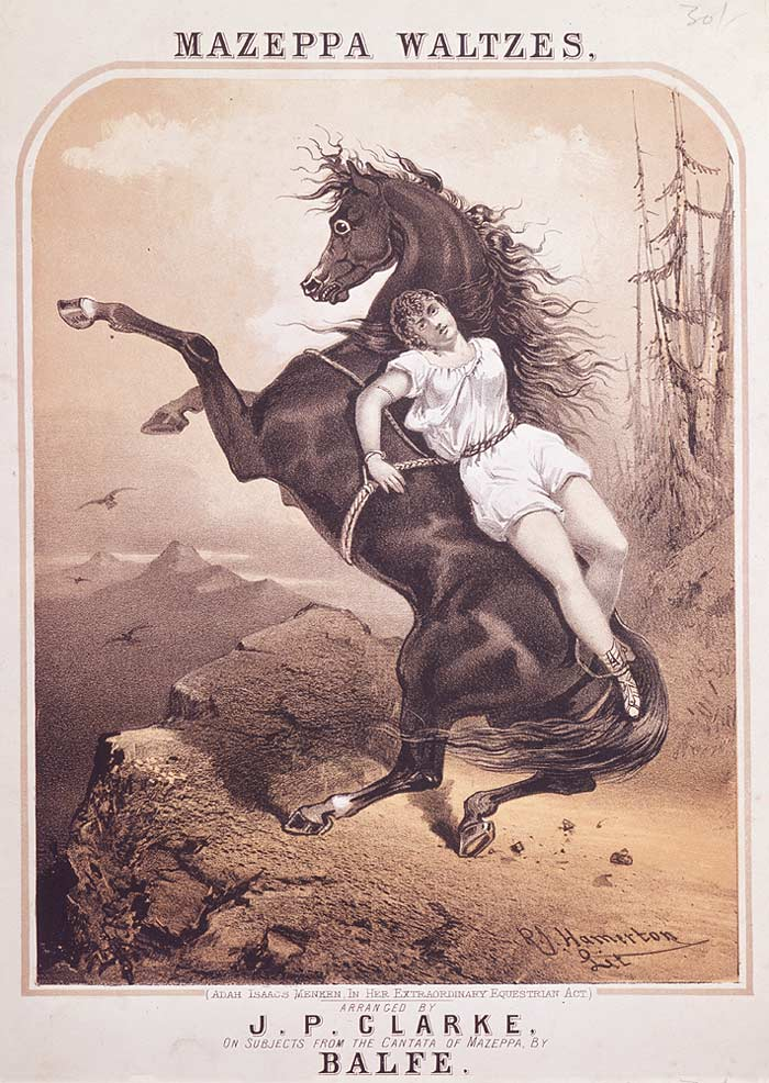 Ілюстрація до кантати Майкла Вільяма Балфа "Мазепа"